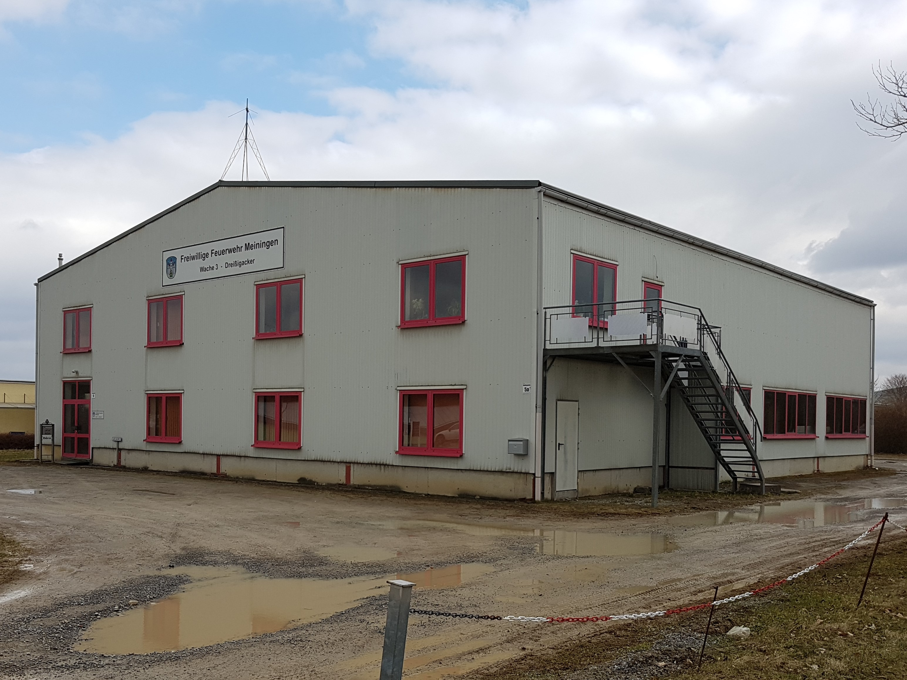 Gerätehaus der Freiwilligen Feuerwehr Meiningen, Wache 3 - Dreißigacker